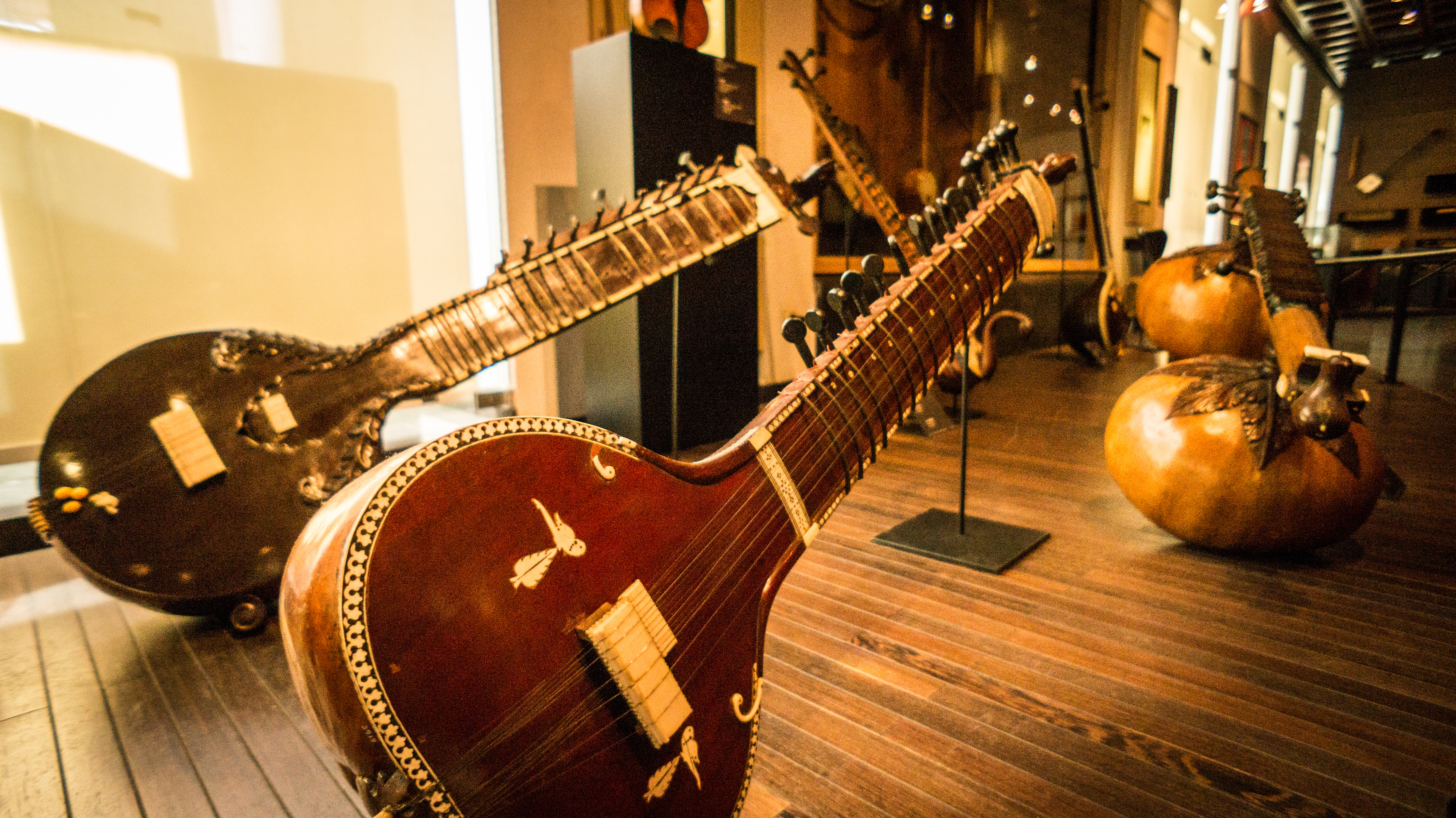 2015-05-302773.jpg